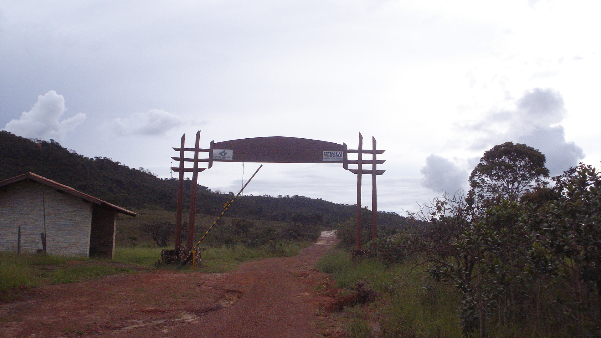 Pireneus